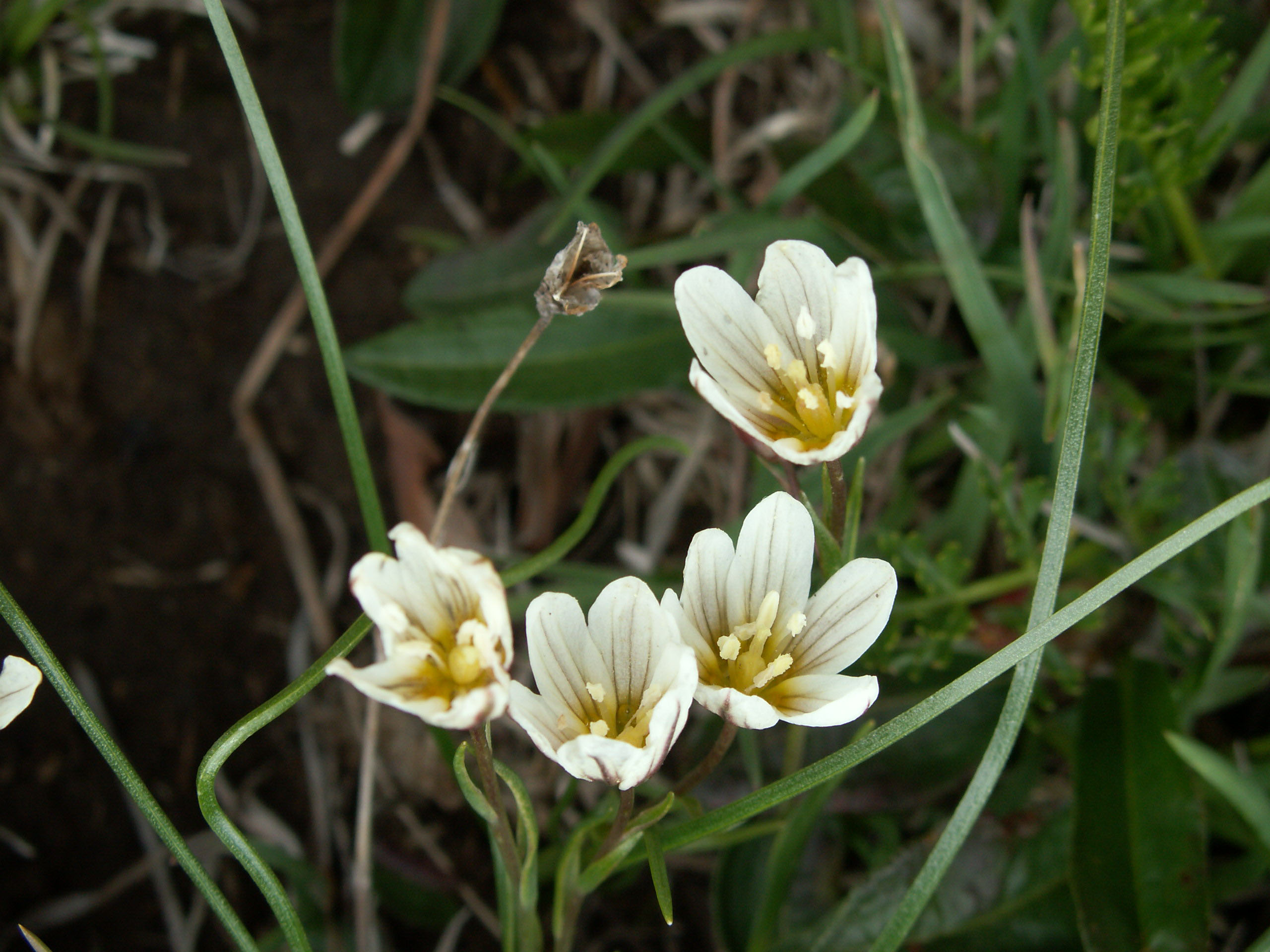 Lloydia serotina, Kanton Bern, Schweiz